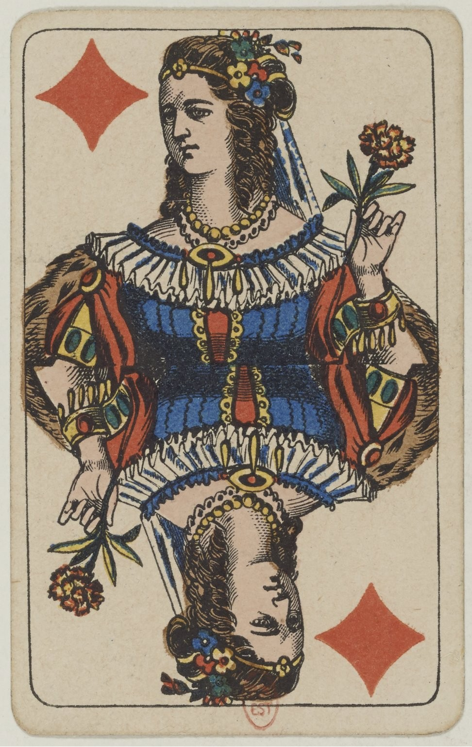 Dama Karo z Wzoru Berlińskiego